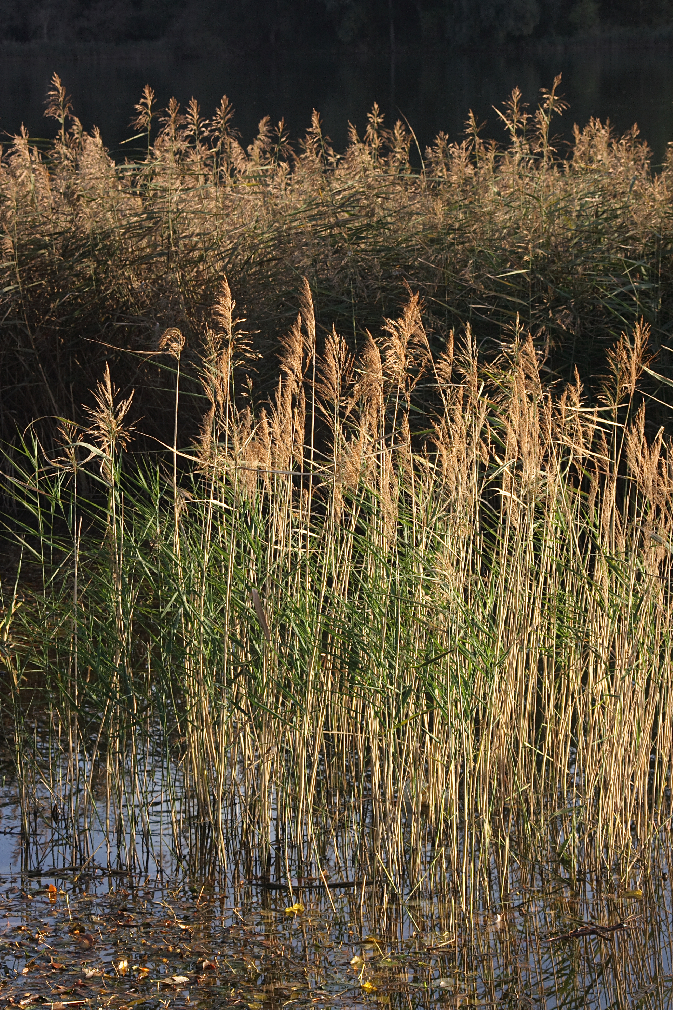 Pohled na rákos obecný z hráze Litovického rybníka